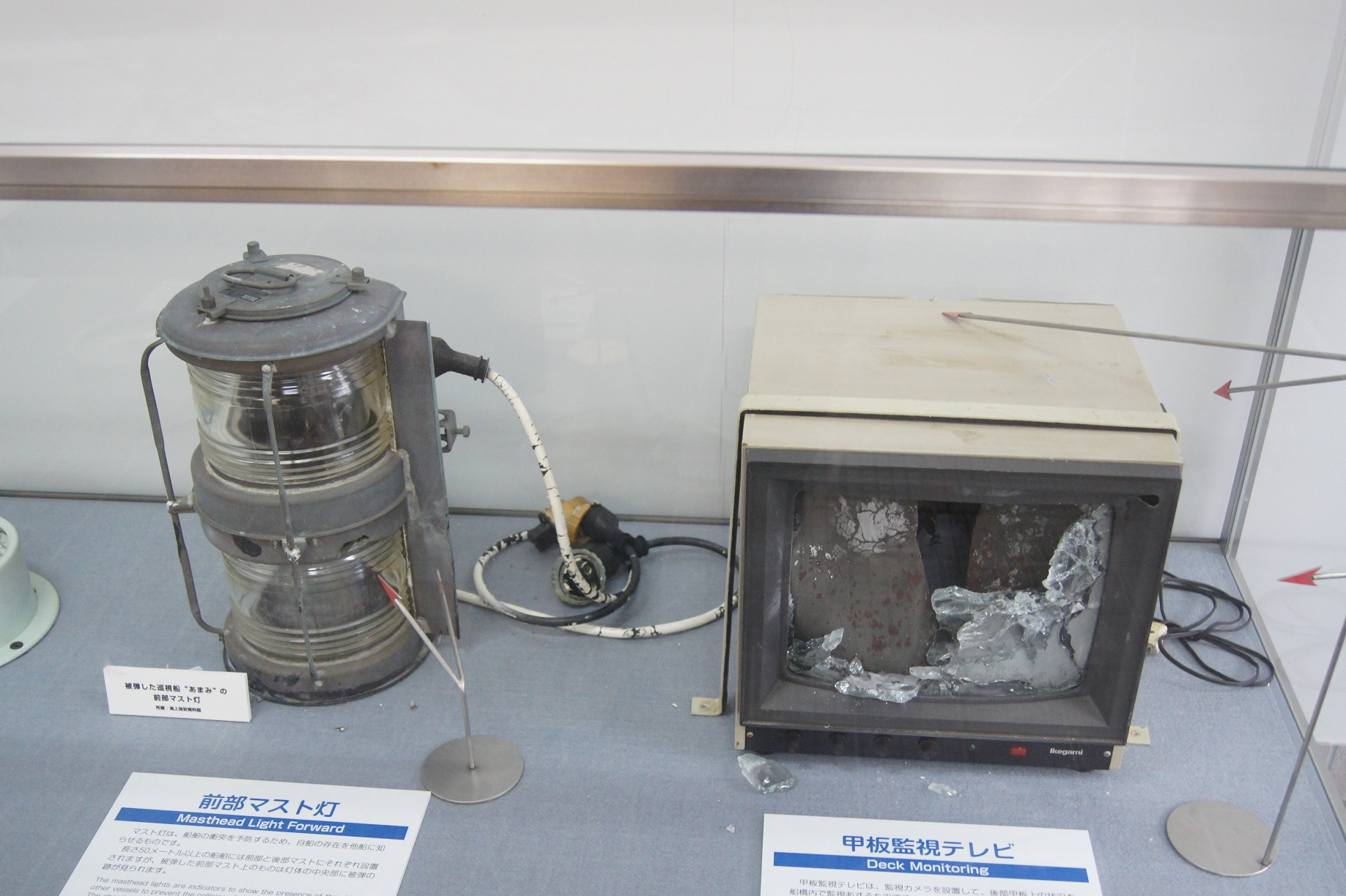 九州南西海域工作船事件で銃撃をうけ、破損したja:あまみの前部マスト灯と甲板監視TV（海上保安大学校資料館にて撮影）